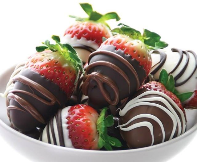 frutillas bañadas en chocolate